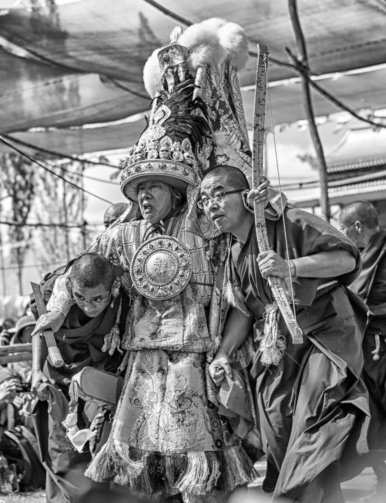 Ladakh